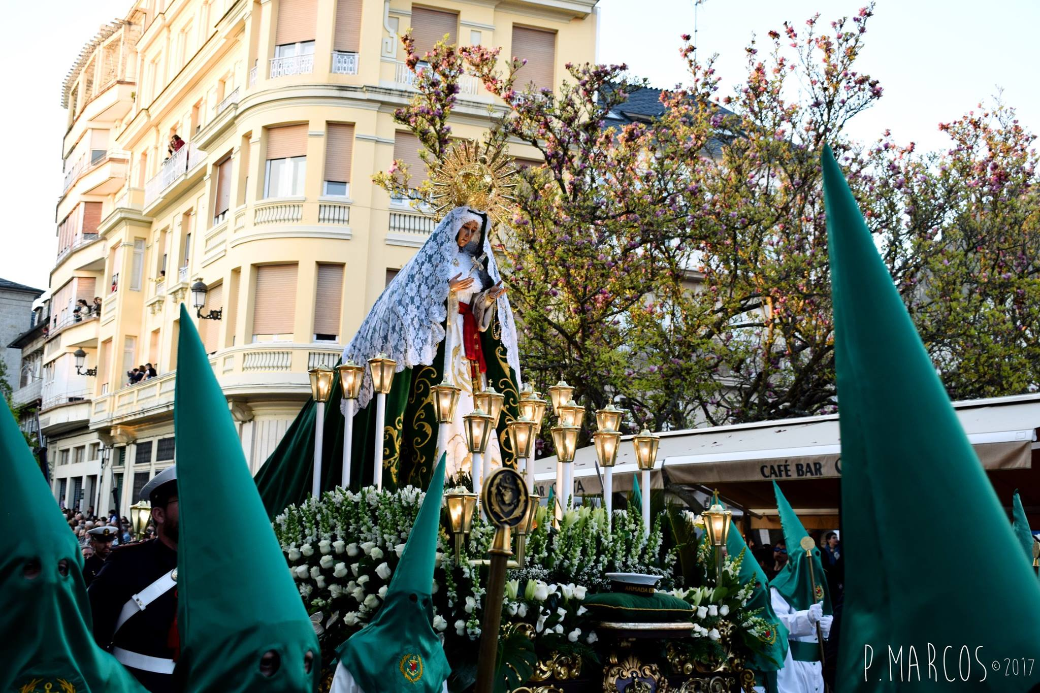 Paso de la Virgen de la Esperanza de Lugo